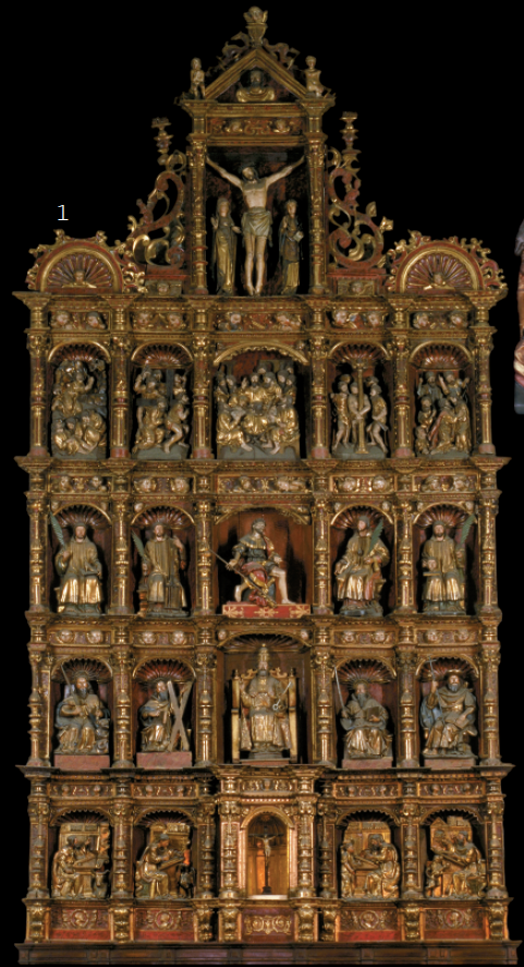 Pedro Santuaren aldare nagusiko erretaula, Bergara